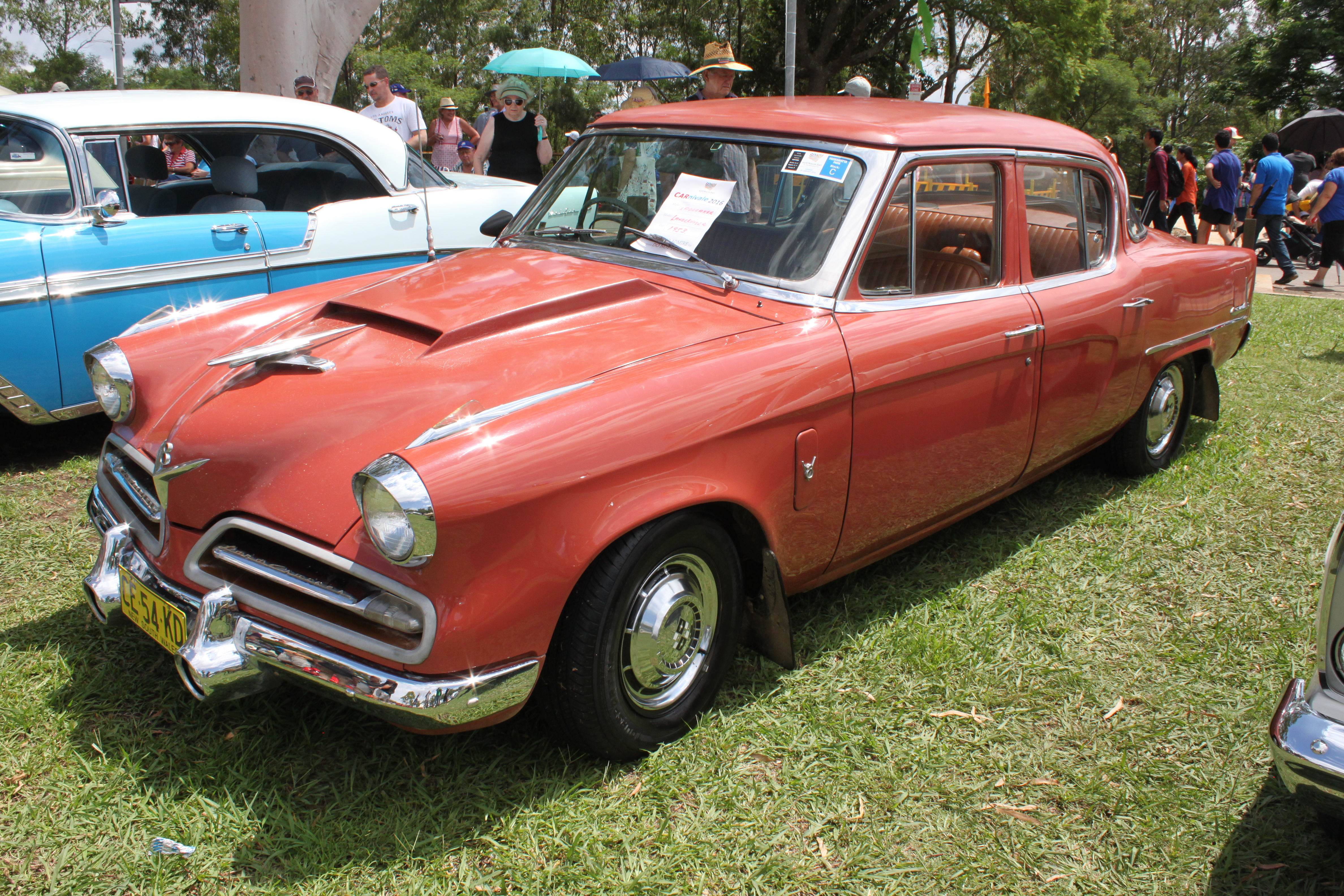 CARnivale, Parramatta Park, NSW Australia Day 2016